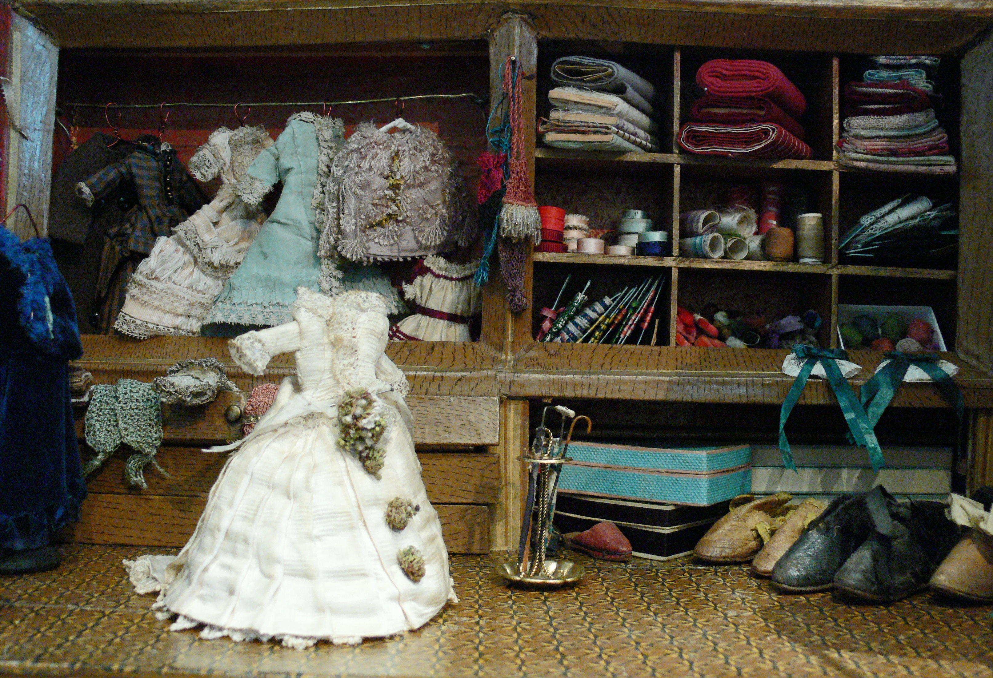 Puppen-Kleiderladen, spätes 19. Jahrhundert Schlossmuseum Aulendorf (Zweigmuseum des Württembergischen Landesmuseums)